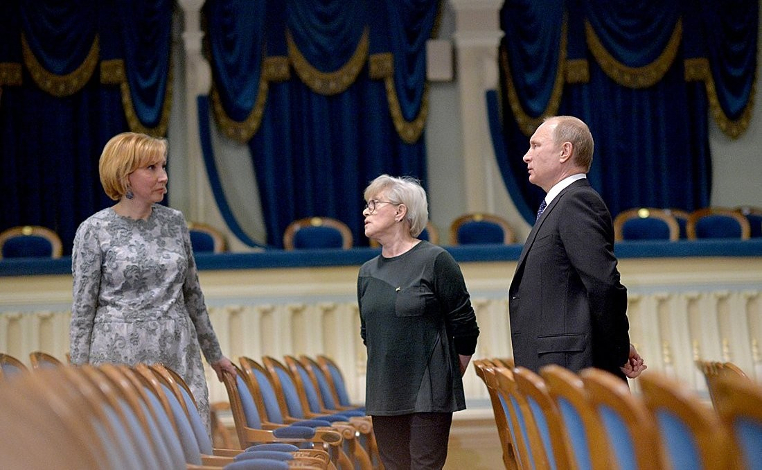 Владимир Путин осматривает реконструированное здание Большого драматического театра имени Г.А.Товстоногова.